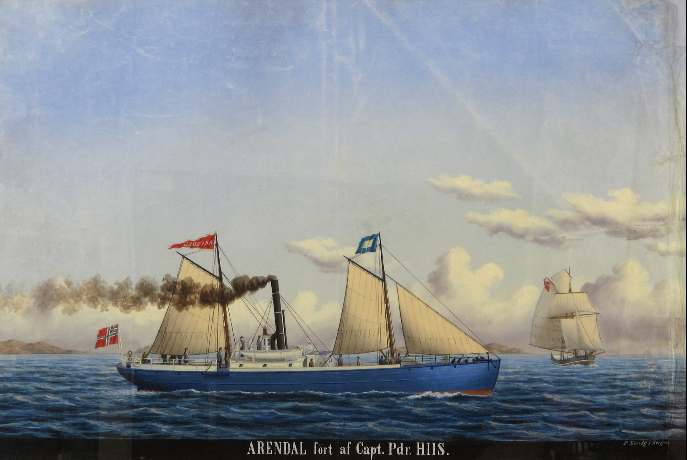 DS «Arendal»» var et kystruteskip som gikk i kystrutefart på Sørlandet for Arendals Dampskibsselskab og på Nord-Norge som Vesteraalen Dampskibsselskabs første skip «Vesteraalen». I 1890 ble skipet solgt til Nordfjords Dampskibsselskab, og gikk i kystrutefart på Vestlandet for en rekke rederier i perioden 1890-1947. Lengst, 32 år, gikk skipet for Møre Fylkes Ruteselskap og forgjengeren AS Romsdals Dampskibsselskab.